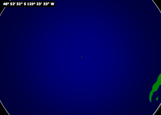 Poluso de neatingebleco en la Pacifika Oceano